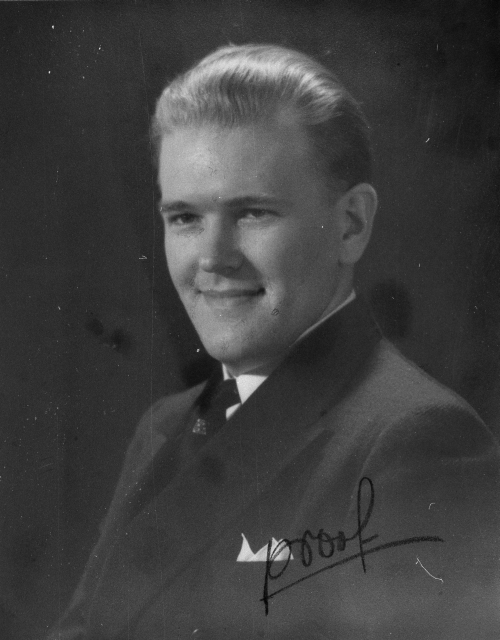 MuuseumikoguFotokoguOlemusfotoSäilivusmääramata legend Fk 2731:1 - 1336 Eesti Vabariigi suursaadik Ameerika Ühendriikides ja ÜRO-s Ernst Jaaksoni (1905 - 1998) isiklik fotokogu, saadud tema kogust (New York 10708 Bronxville 900 Palmer Road) peale surma 1999 aastal. v.v. akt 2000:24 + esemed k/r 506 Fotograaf teadmata kommentaar Fk 2731:1 - 1336 Eesti Vabariigi suursaadik Ameerika Ühendriikides ja ÜRO-s Ernst Jaaksoni (1905 - 1998) isiklik fotokogu, saadud tema kogust (New York 10708 Bronxville 900 Palmer Road) peale surma 1999 aastal. v.v. akt 2000:24 + esemed k/r 506 Fotograaf teadmata